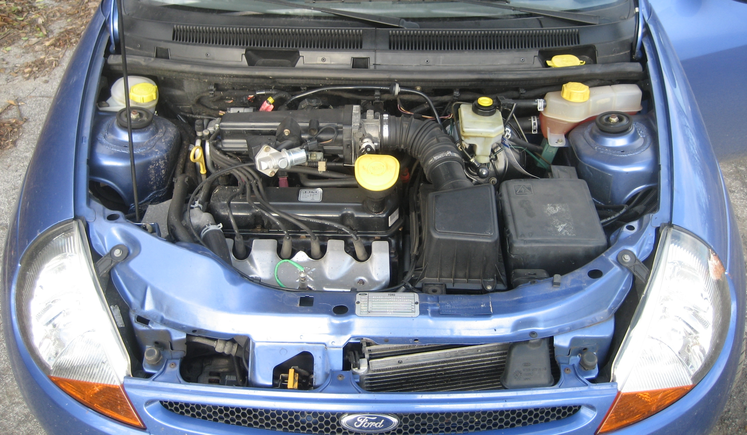 der Motoraum eines Ford Ka